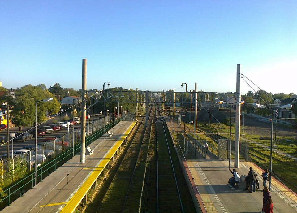 Vista de los andenes desde el puente peatonal en la Estación Alejandro Korn, en dirección a Guernica.